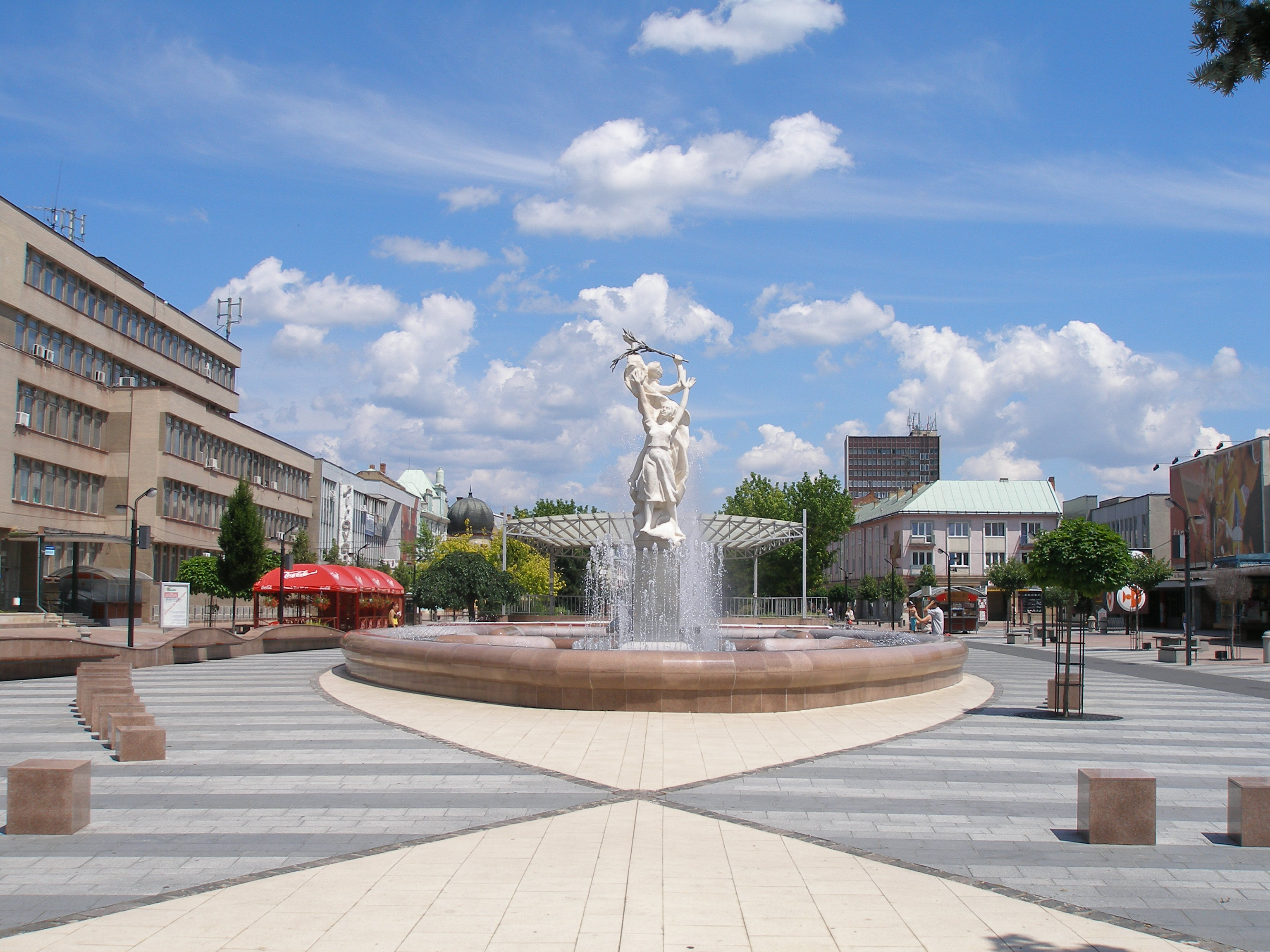 Michalovce, okresné mesto, región Zemplín